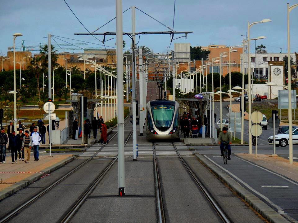 Tramway à Salé, photo, 2013